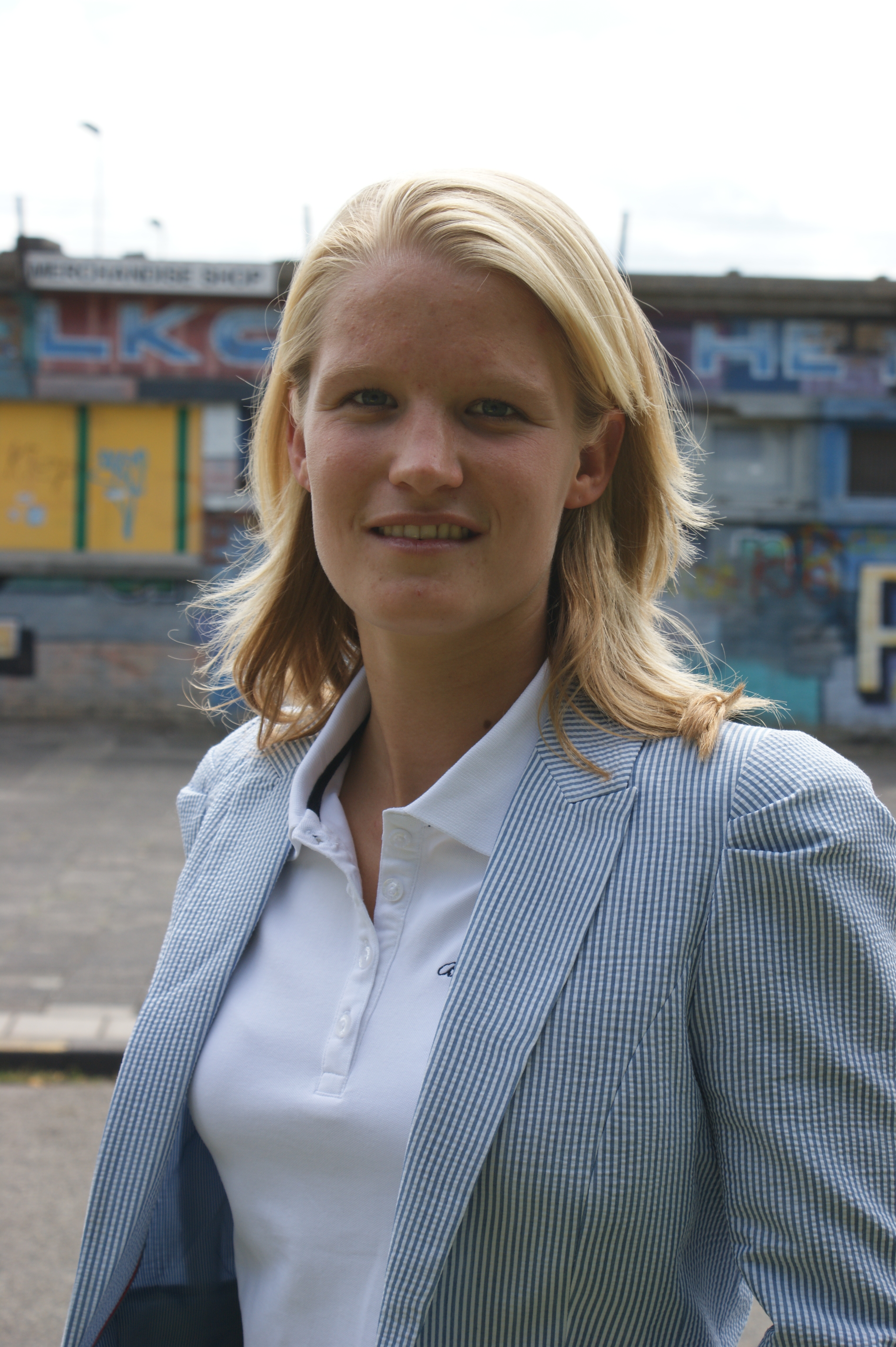 Mandy van den Berg (26 augustus 1990) is een Nederlands voetballer die speelt voor ADO Den Haag in de Eredivisie Vrouwen.